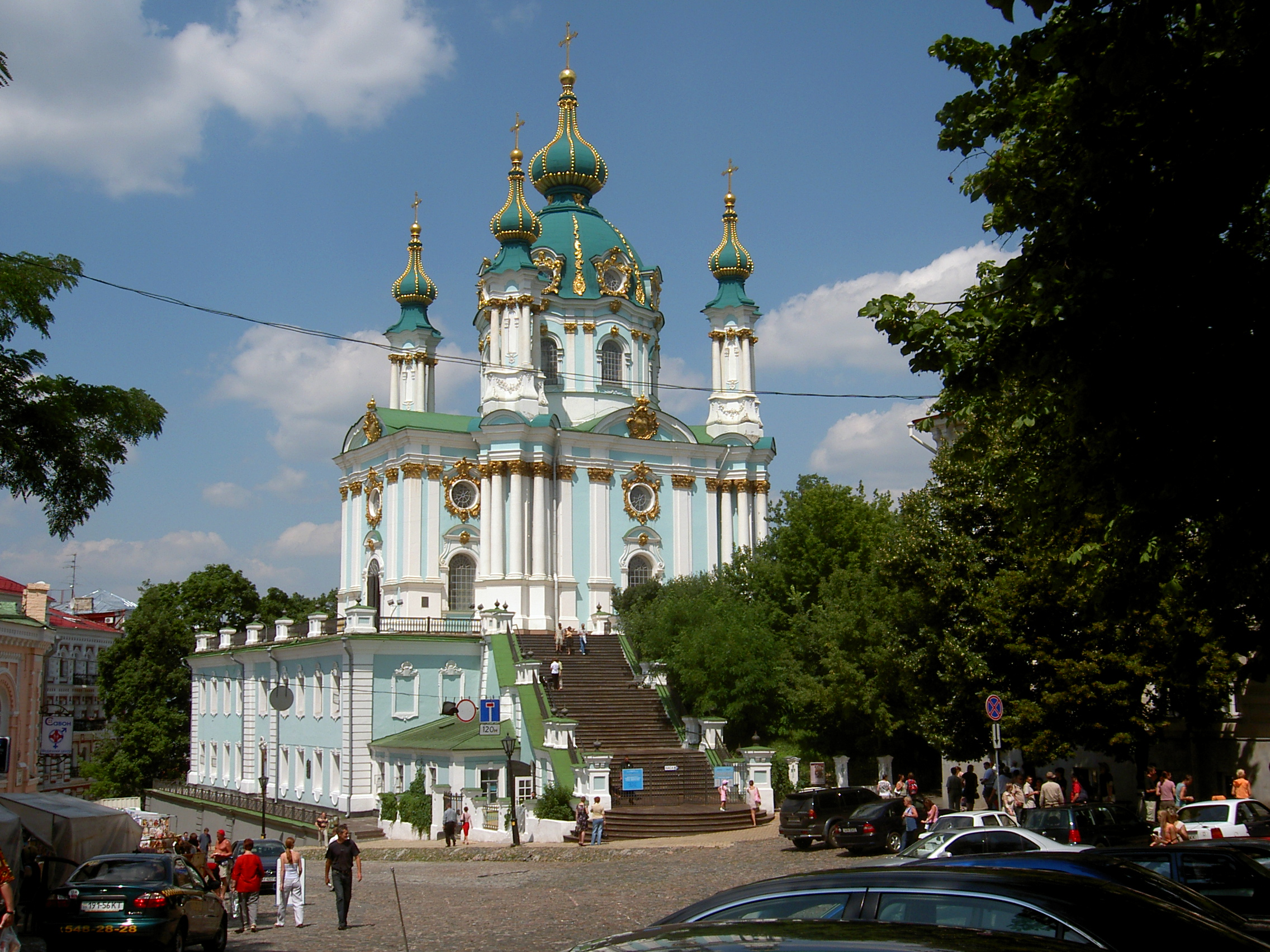 Chrám svatého Ondřeje v Kyjevě